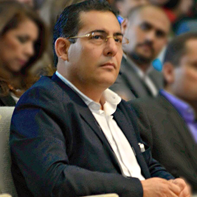 Patricio Zambrano Restrepo (Quito, 25 de agosto de 1969), es un político ecuatoriano que actualmente se desempeña Presidente Nacional del Partido Socialista Ecuatoriano*, así como como Parlamentario Andino*.